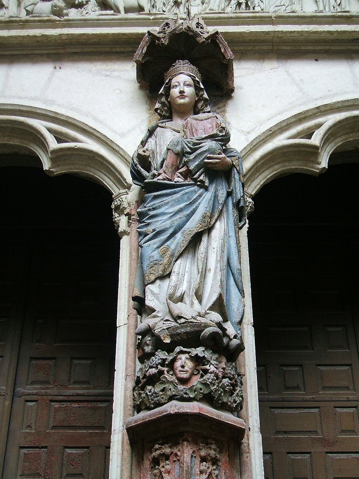 Virgen con el Niño, Pórtico Viejo, iglesia de San Pedro Apóstol, Vitoria-Gasteiz (s-XIV)